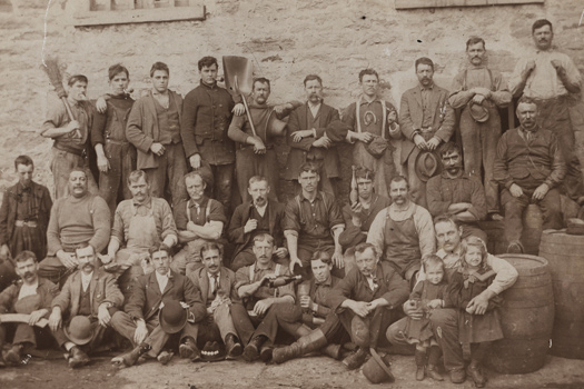 Employés de la brasserie Dawes, Lachine